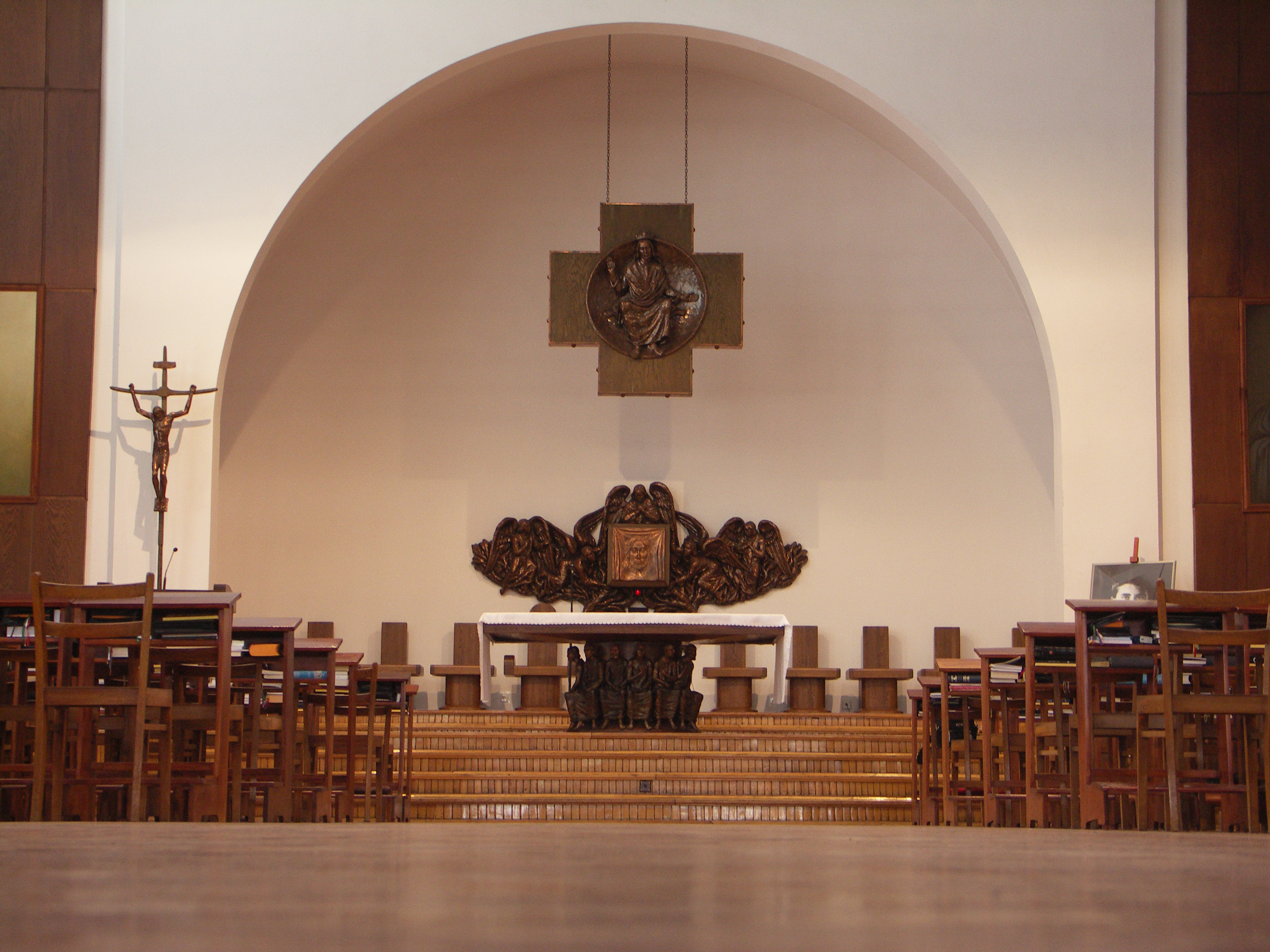 Katowice, kaplica w Wyższym Sląskim Seminarium Duchownym